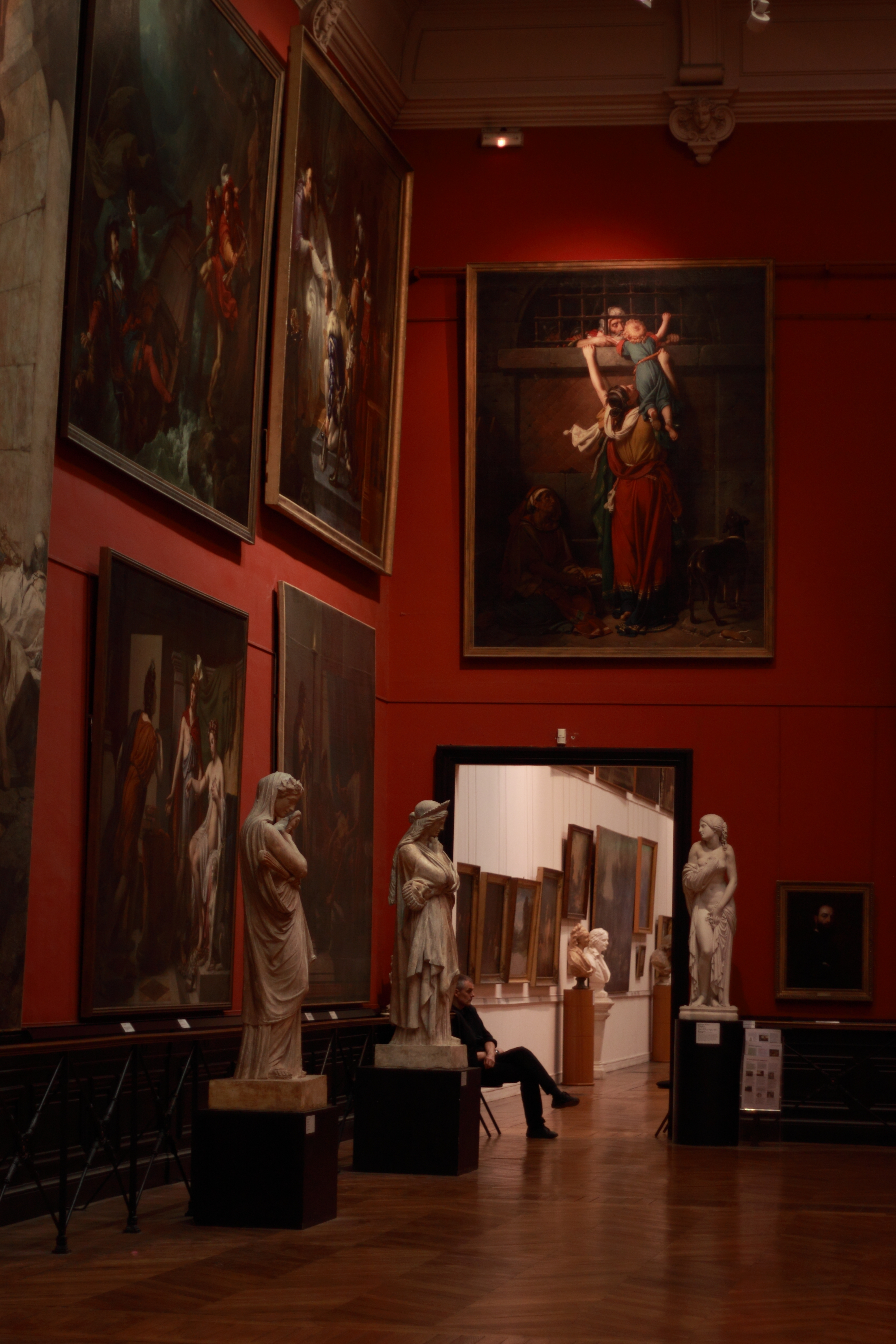 Salon rouge, musée des Augustins